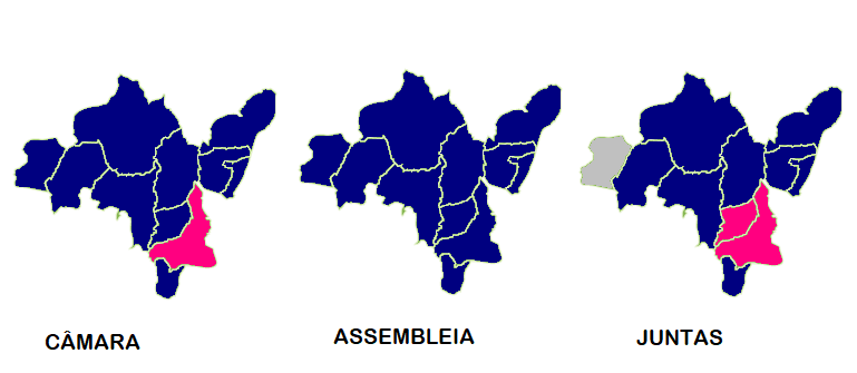 Mapa ilustrativo do partido mais votado por freguesia na Maia (2017)